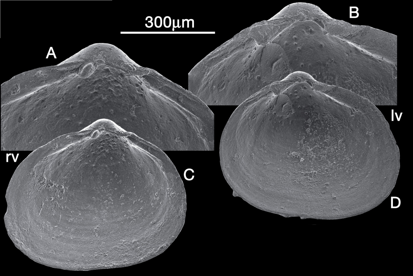 Kelliola symmetros (Jeffreys, 1876), Montacutidae, Bivalvia, Holotype, USNM 170626, from Oliver (2012: figs.2A-D), lv = left valve, rv = right valve